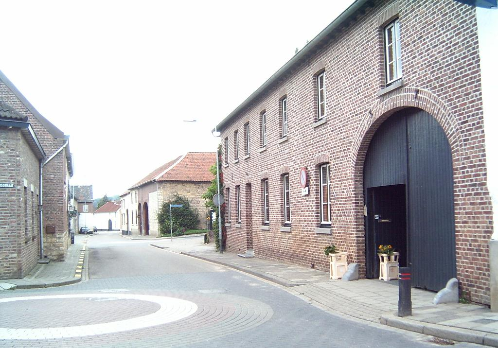 Limburgs: RanzelRanzel, Ransdaal dörpsgeziech